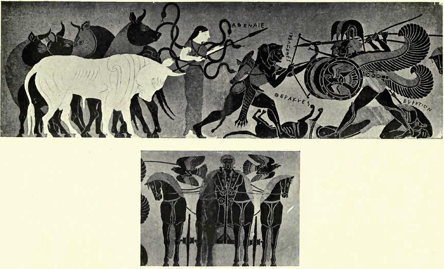 Μελανόμορφος αμφορέας με εικόνα μάχης του Ηρακλή με τον Γηρυόνη